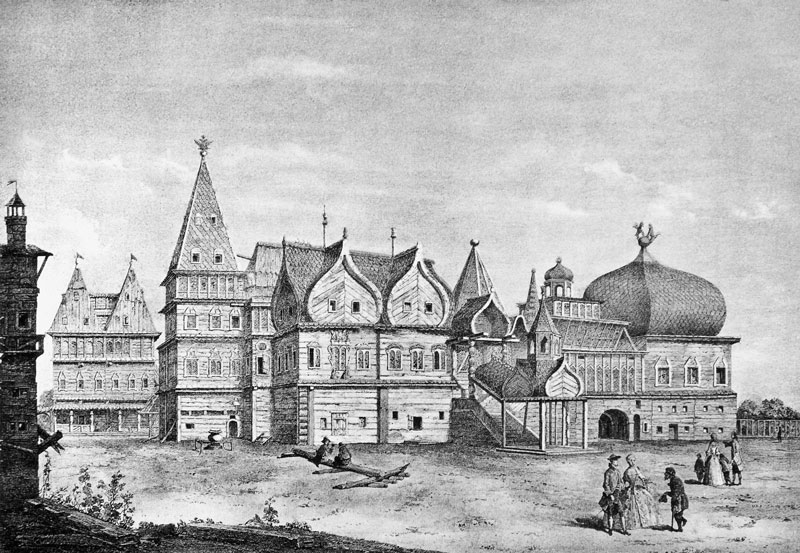 Дворец в селе Коломенское. Конец XVIII века. Из альбома Н.Л.Найденова [1]